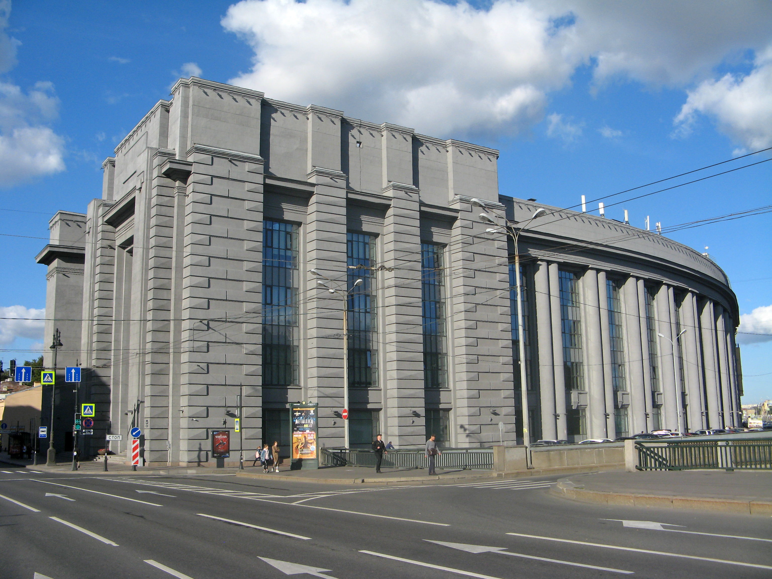 Здание Фрунзенского универмага: Московский проспект, 60, набережная Обводного канала, 129, Адмиралтейский район, Санкт-Петербург